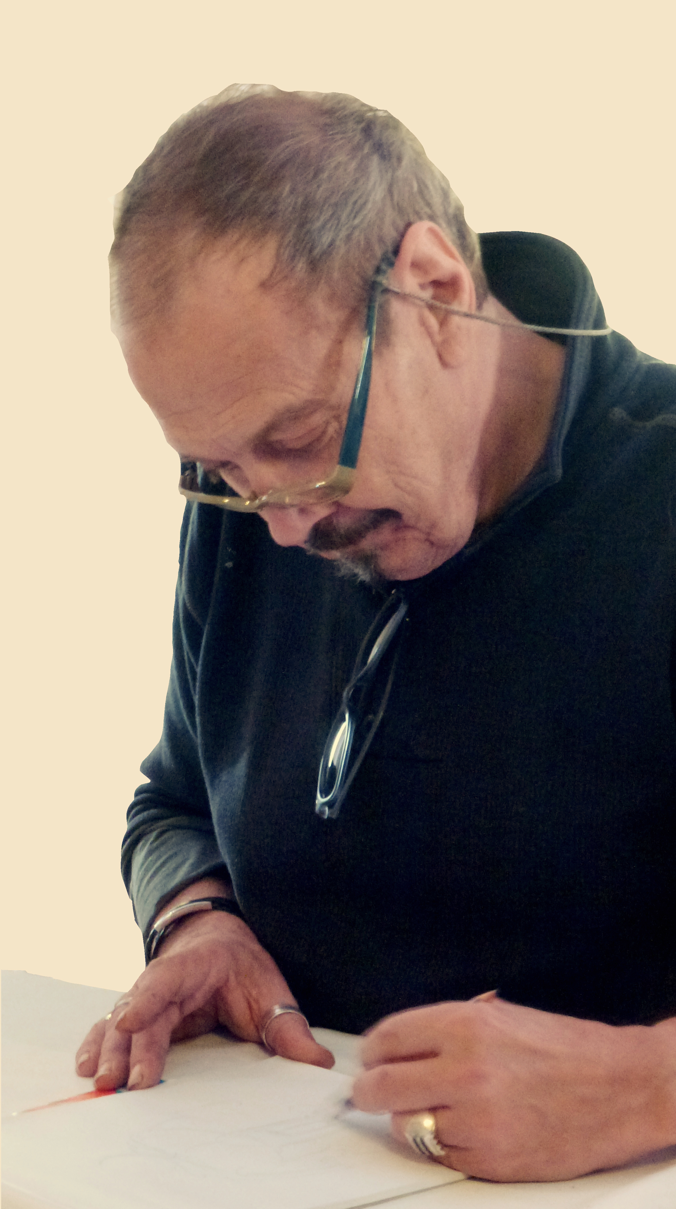 Eric De Rop is een Vlaams stripkunstenaar. Hij werd gefotografeerd tijdens de 10e Strips op de Markt in Gouda NL